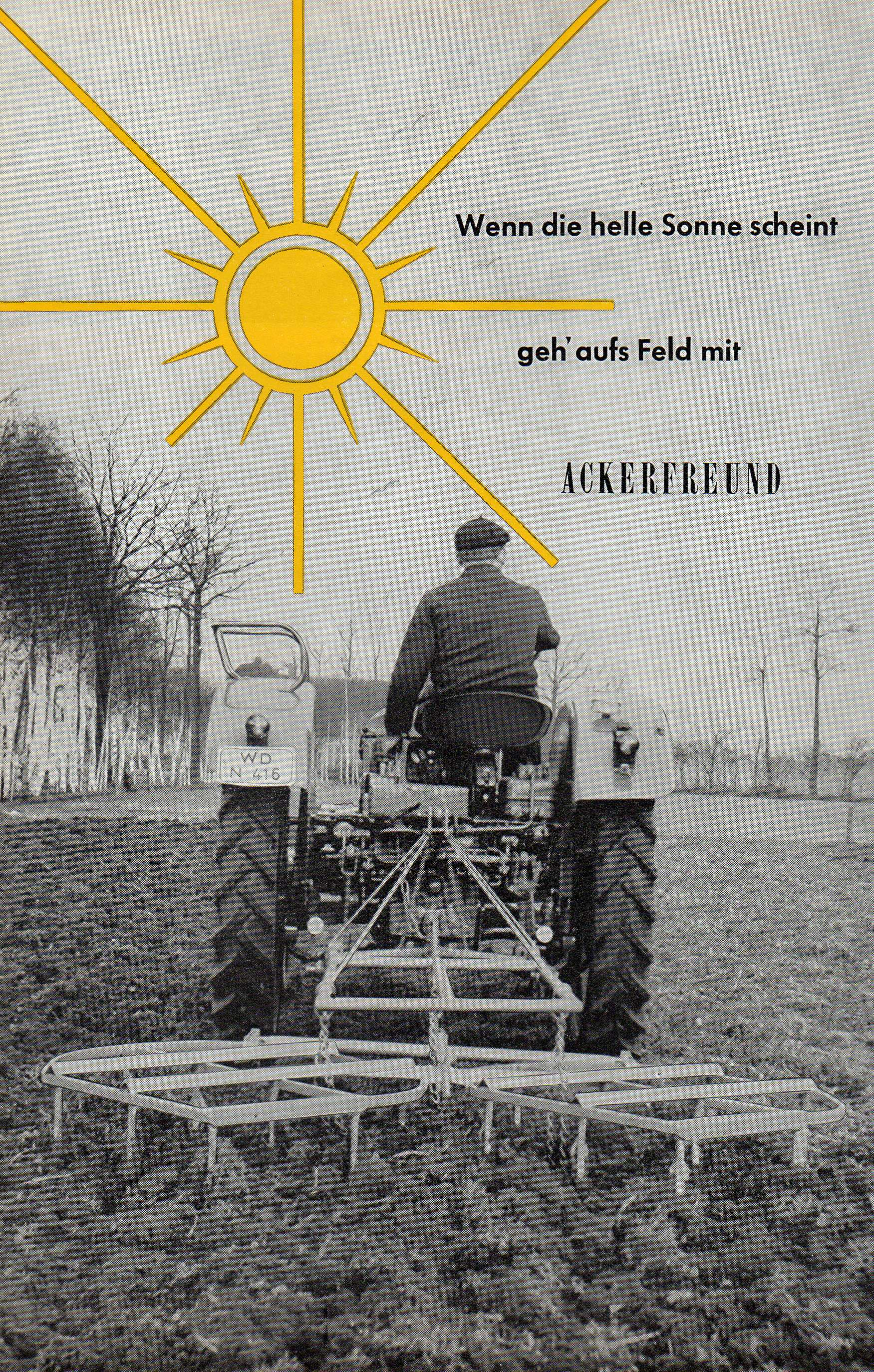 Auszug aus dem Werbeprospekt zur „Ackerfreund“-Gerätereihe der Firma Köckerling; die Grubberegge „Ackerfreund“ wurde 1955 vorgestellt.